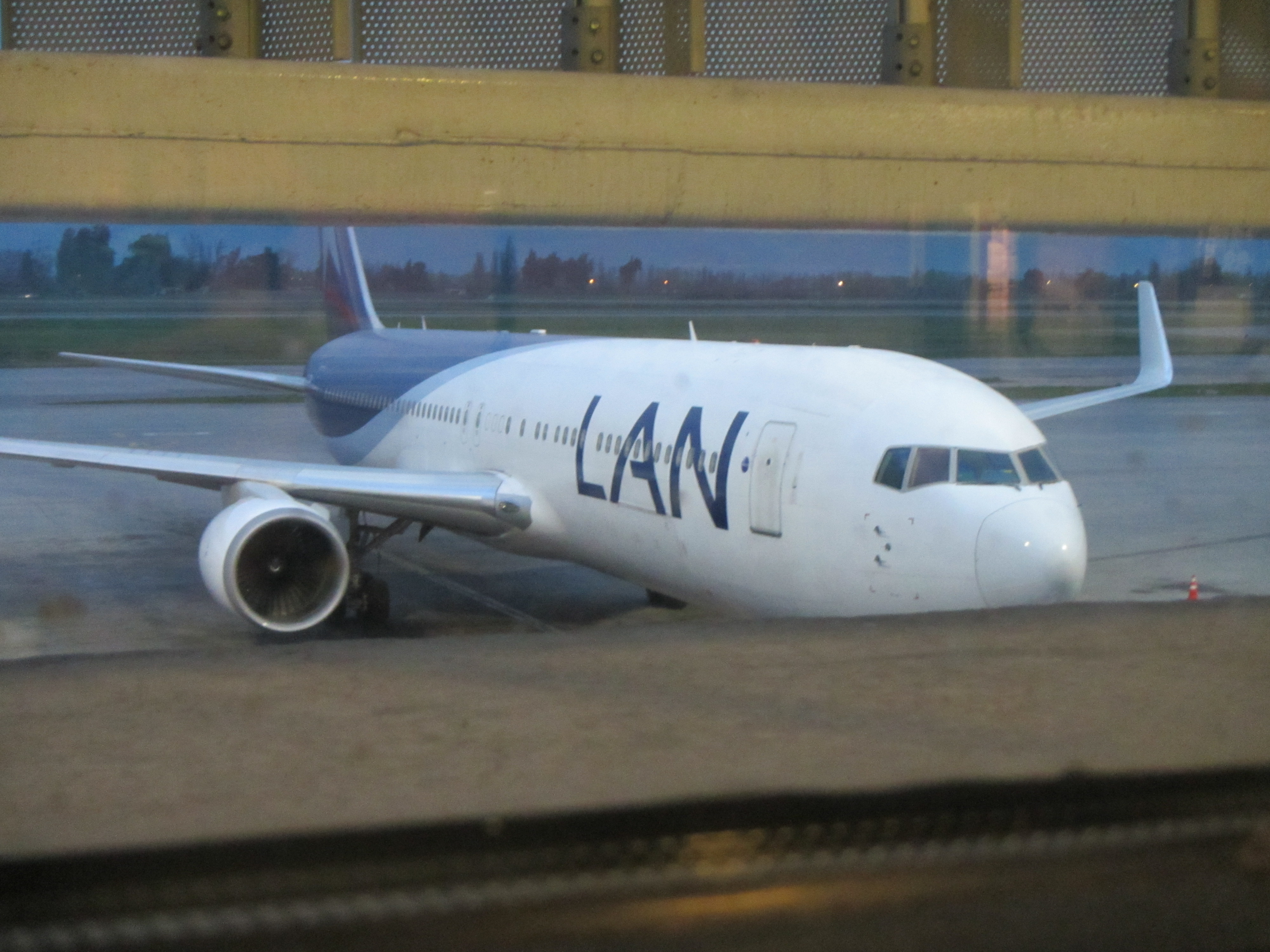 Boeing 767 de Lan Ailrines en aeropuerto de Santiago